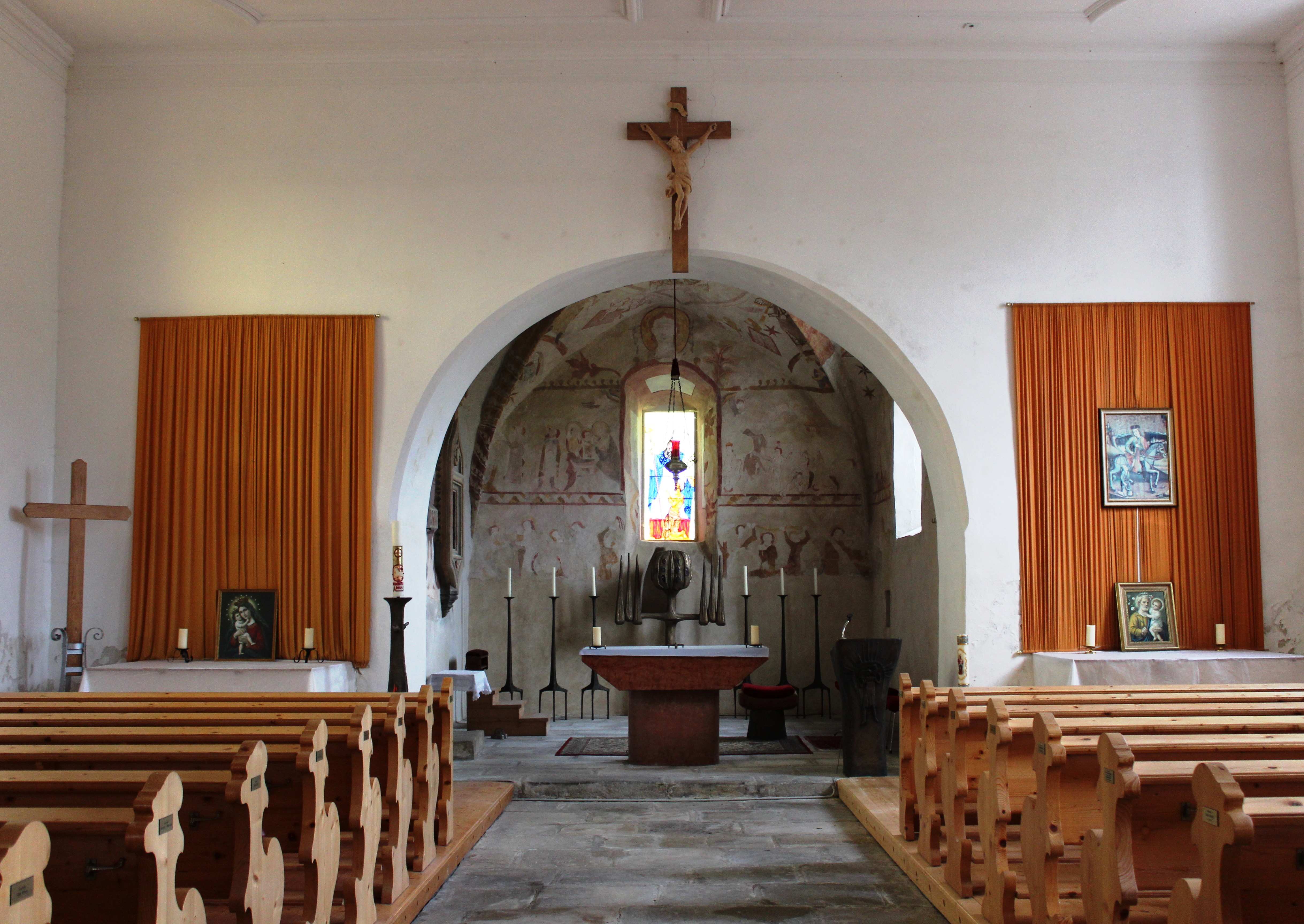 Interiér kostela svatého Martina. Polná na Šumavě v okrese Český Krumlov. Česká republika.